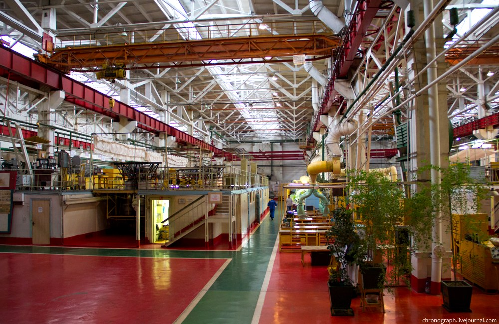 Цех №4, АО "Кузнецов", Самара, Россия